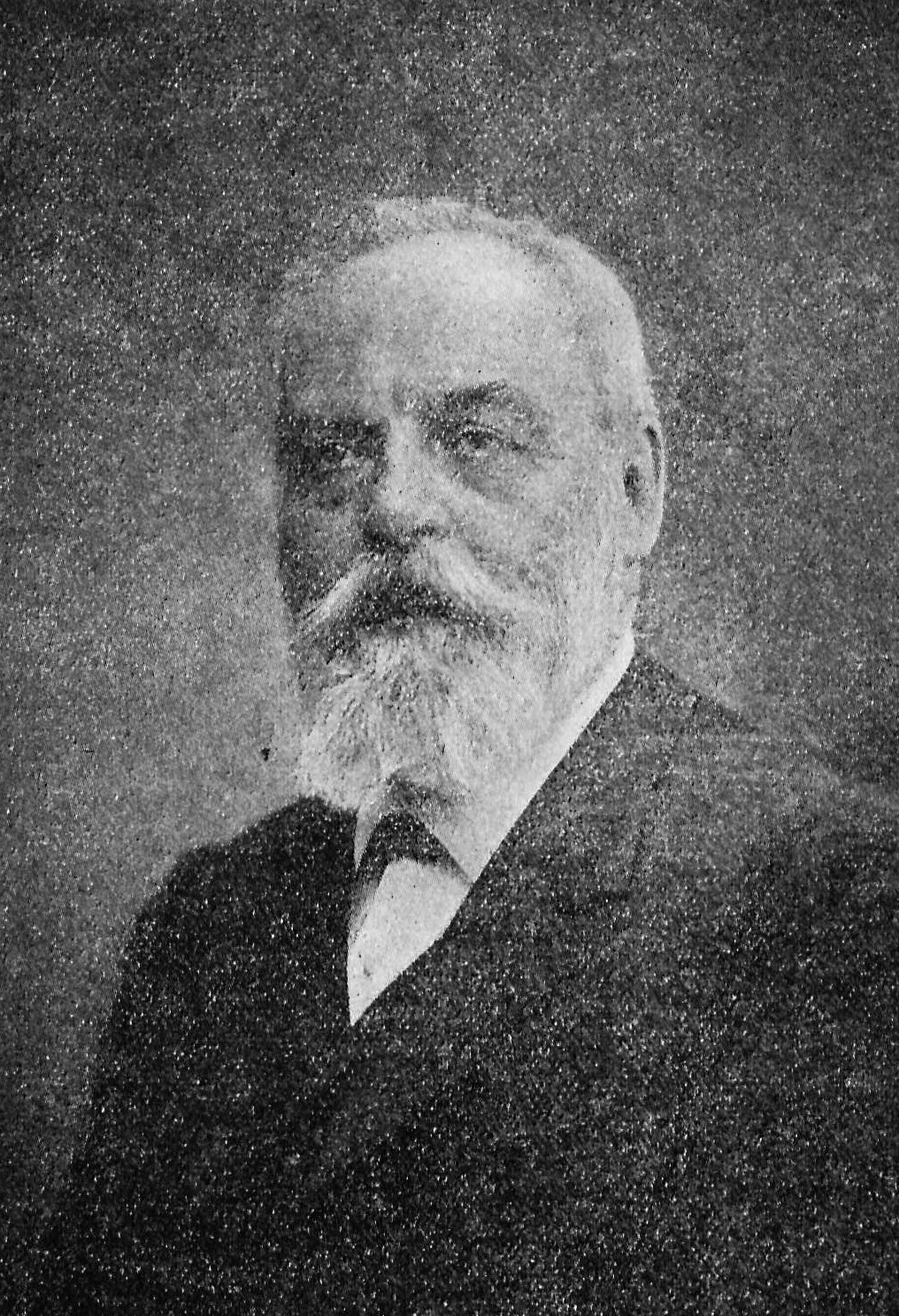 Portrait de Georges Le Monnier